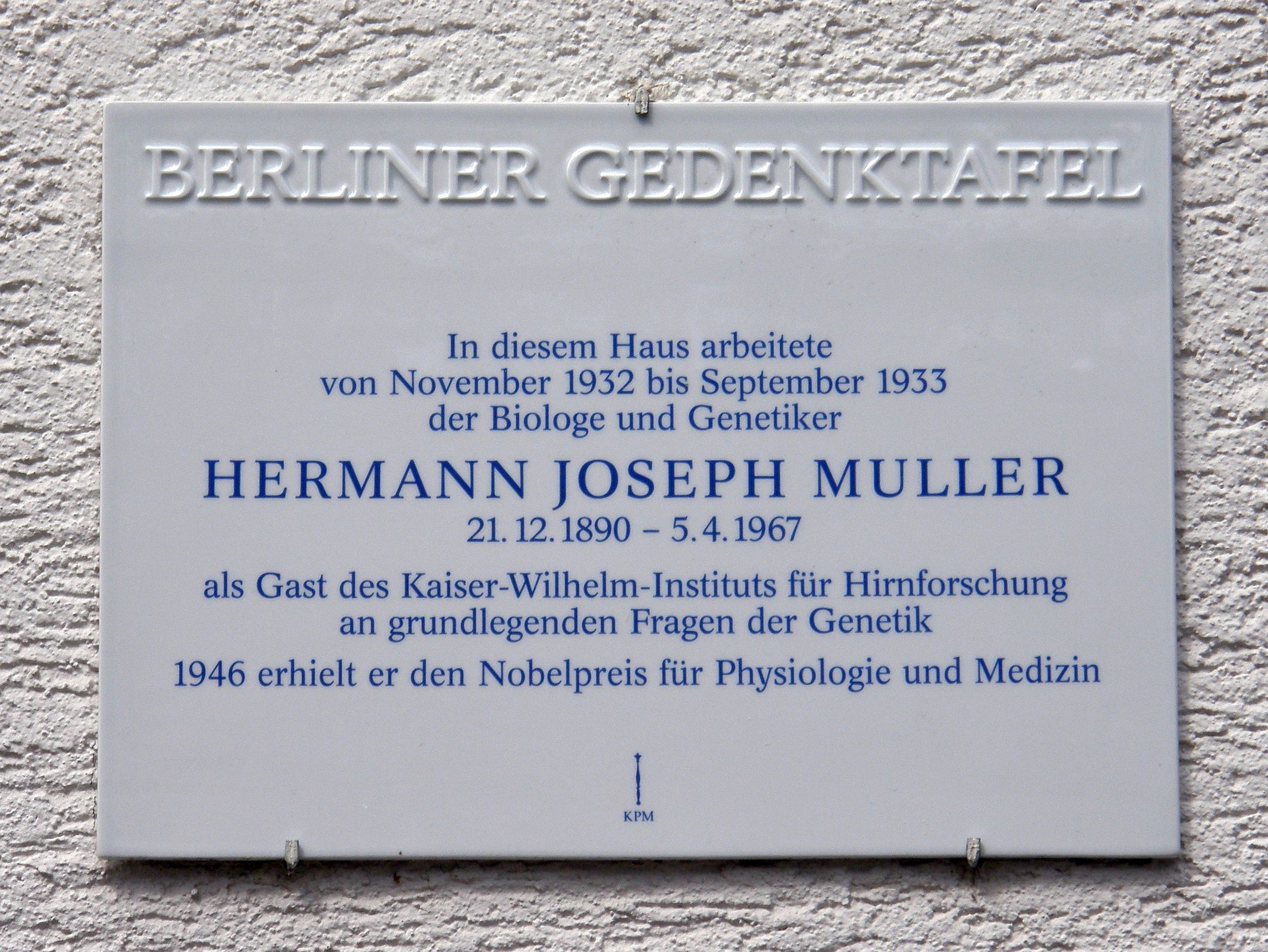 Berliner Gedenktafel für Hermann Joseph Muller am Gebäude des ehemligen Instituts für Hirnforschung in Berlin-Buch.